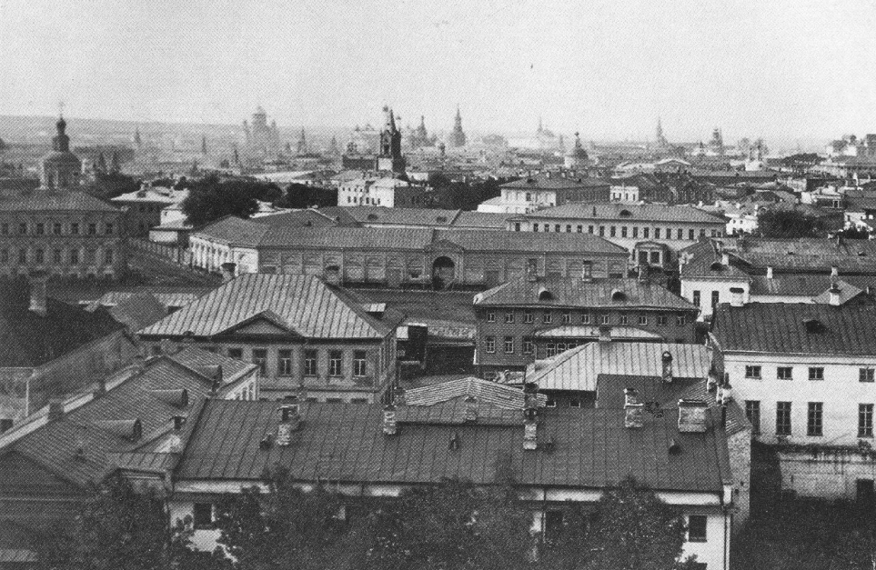 Вид Хохловской площади с колокольни церкви Введения в Барашах. XIX век. Преобладает малоэтажная застройка. На площадь выходят торговые лавки. Слева - церковь Троицы в Хохлах. Посередине - старая лютеранская церковь Петра и Павла.